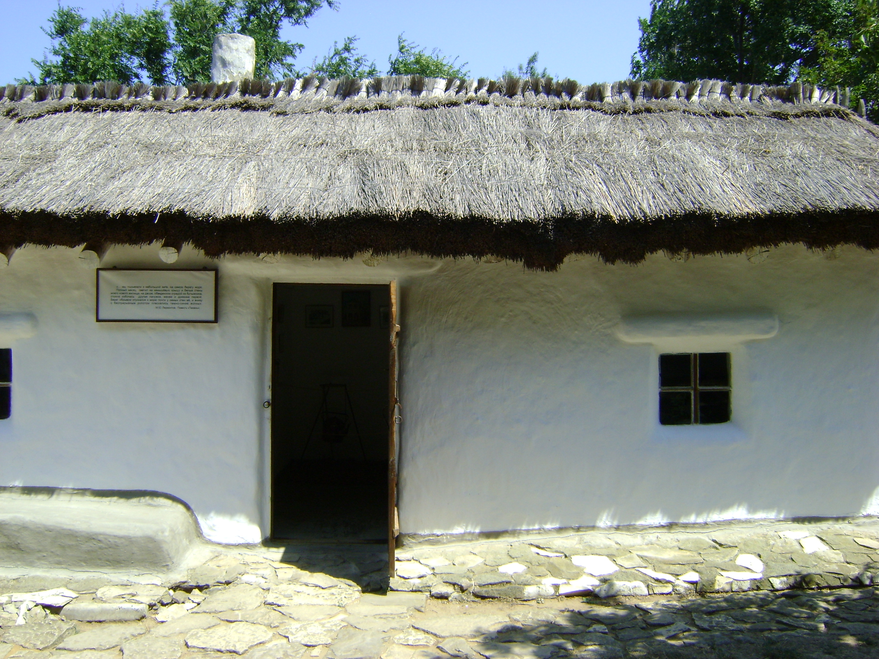 Хата козака Мисника, що знайшла відображення в оповіданні М. Лермонтова "Тамань".